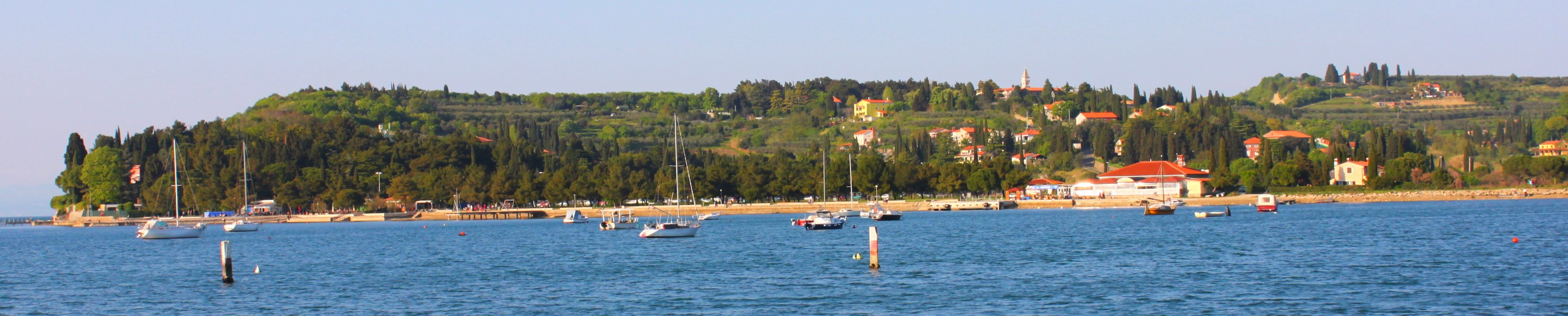 Die Landzunge von Strunjan